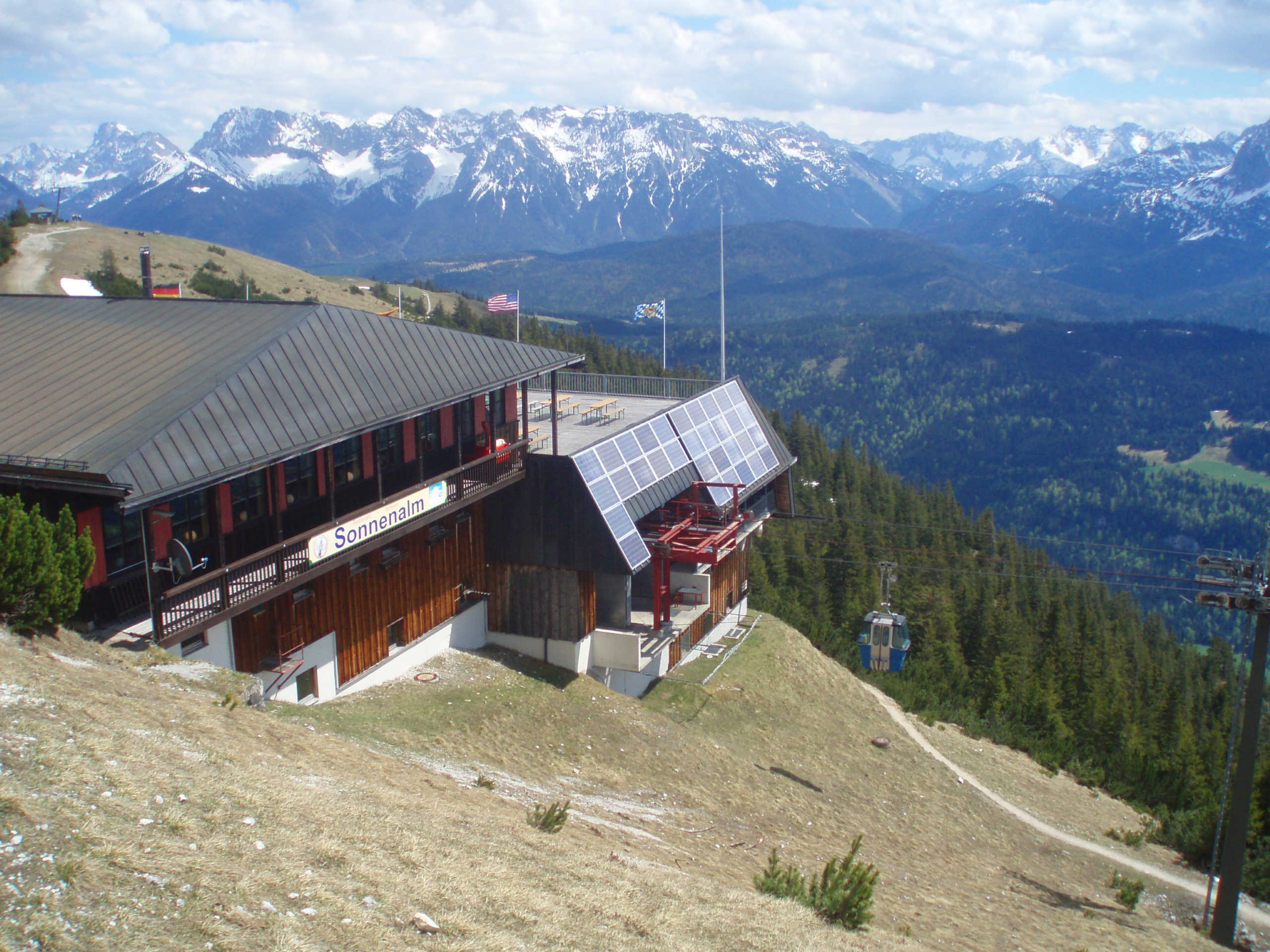 Wankbahn-Bergstation mit Sonnenalm